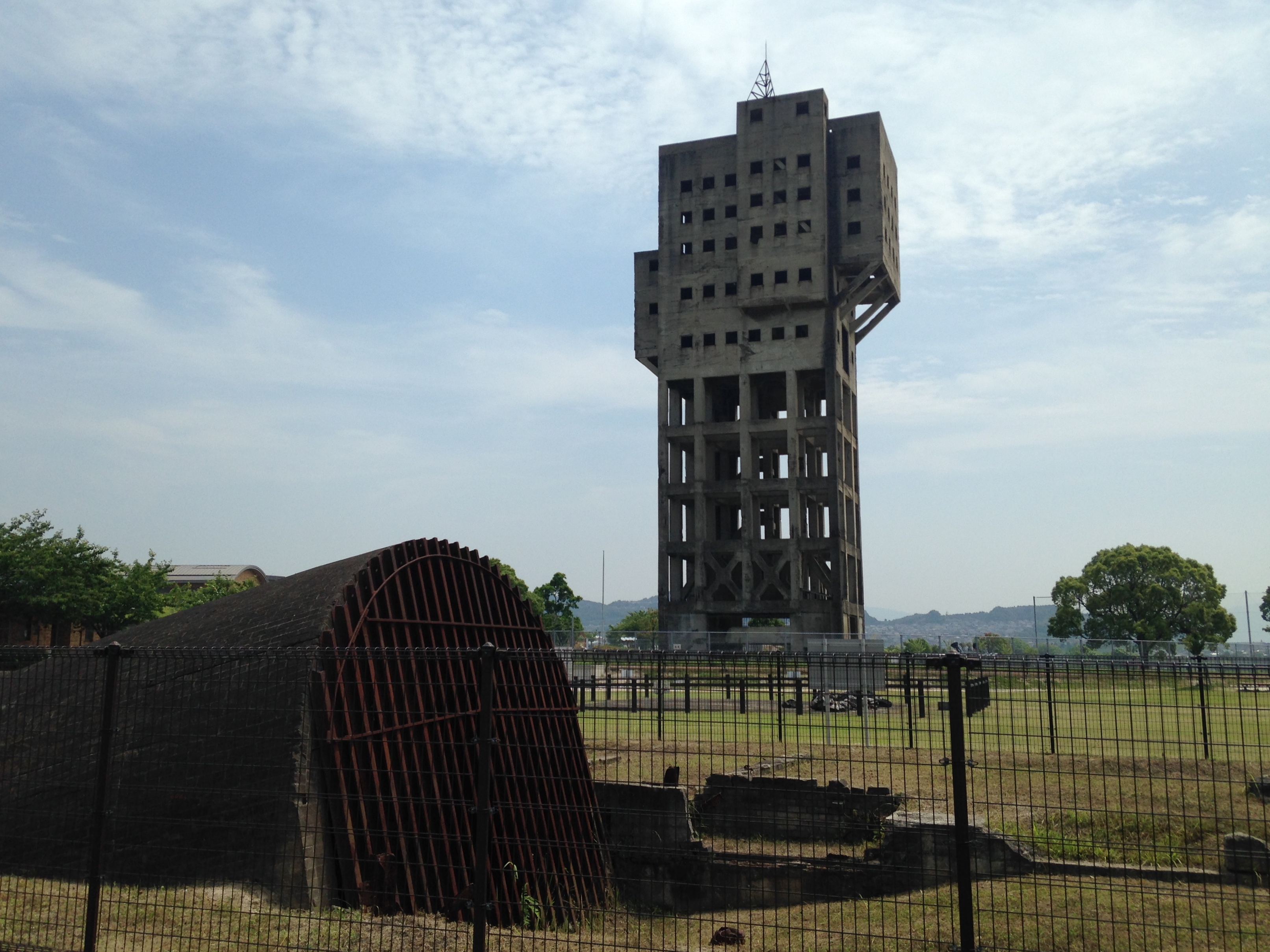 志免鉱業所・竪坑櫓と第八坑連卸坑口跡